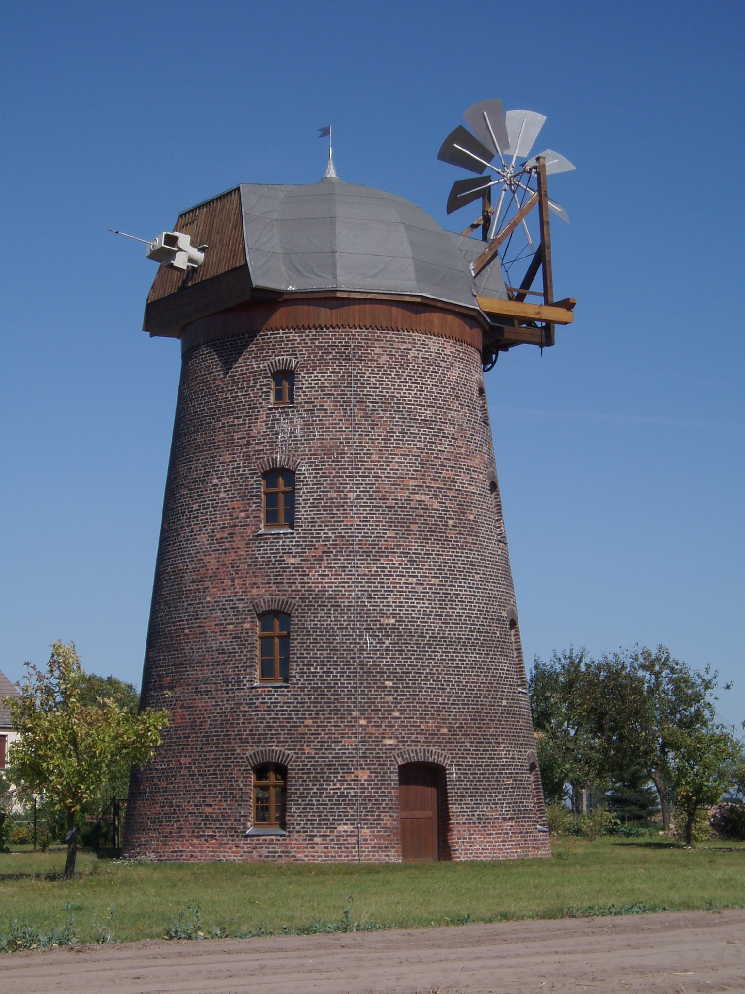 Ansicht von Südwest